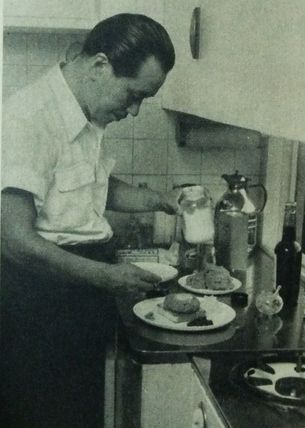 ビフテキを作る岡本太郎